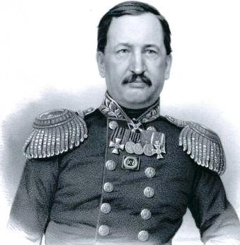 Nikolai Borisovich Gersevanov, General- Maior